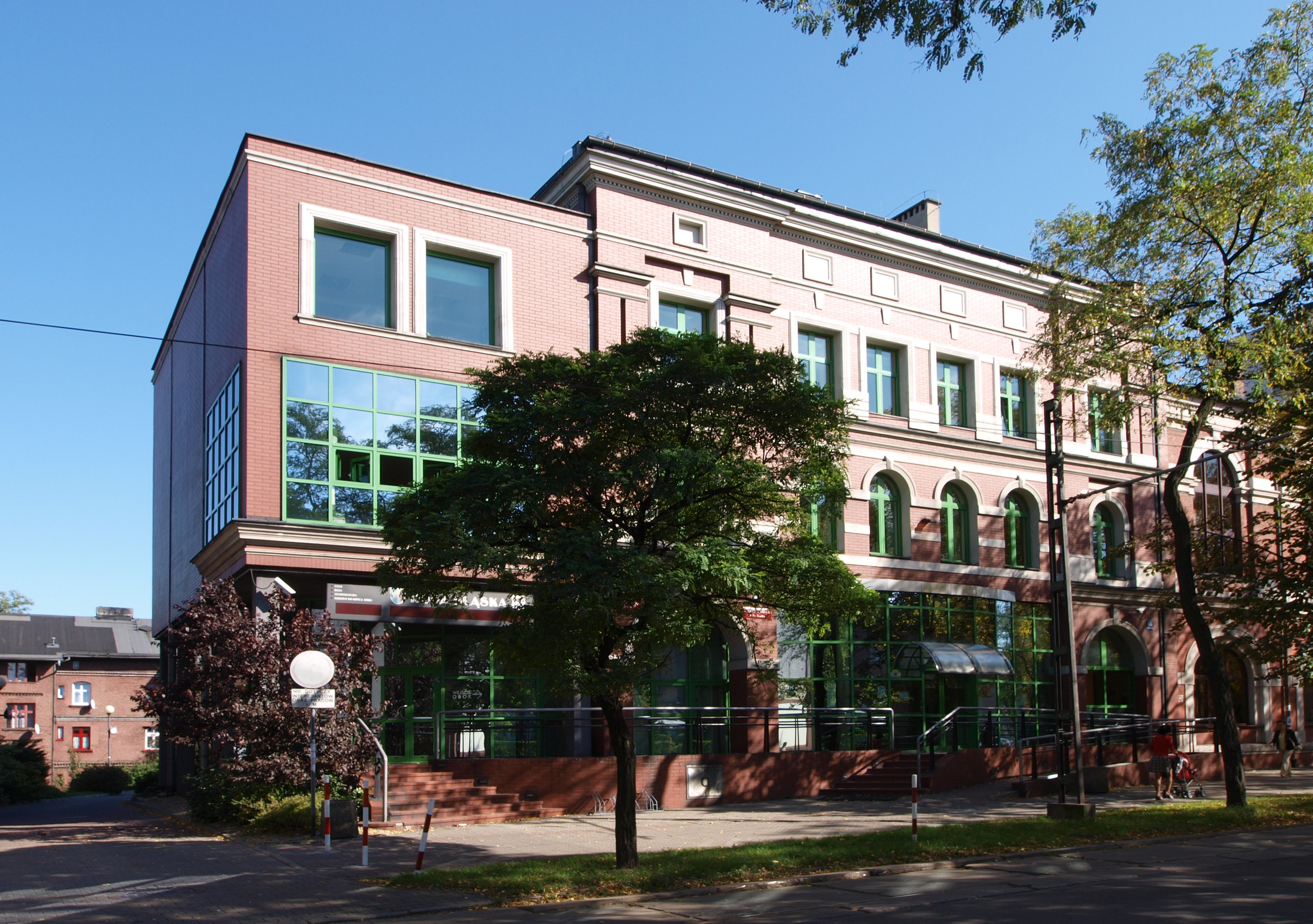 Ruda Śląska, Nowy Bytom. Ulica Niedurnego. Budynek nr 46.